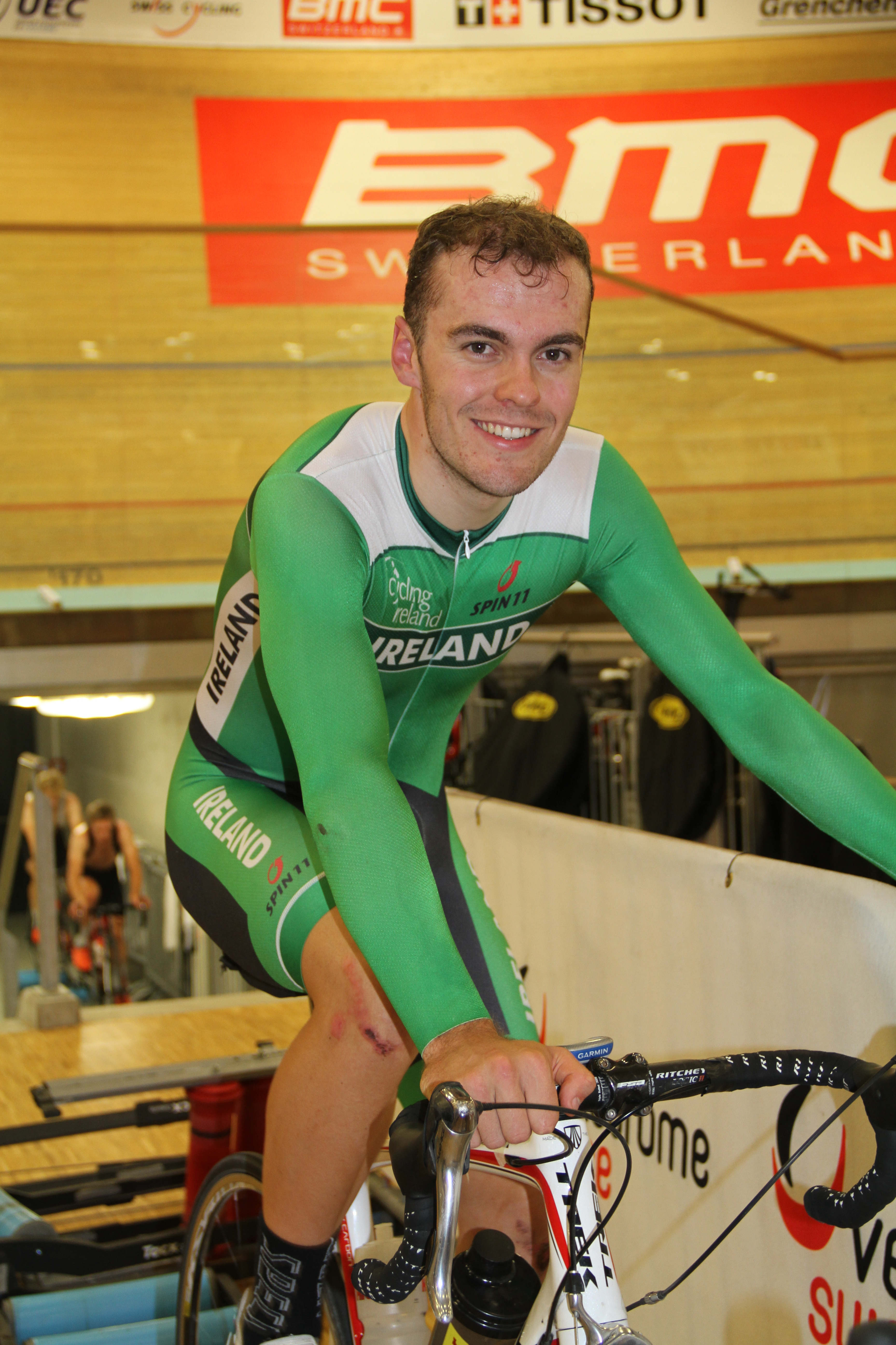 Mark Downey, irischer Radsportler The making of this document was supported by the Community-Budget of Wikimedia Germany.